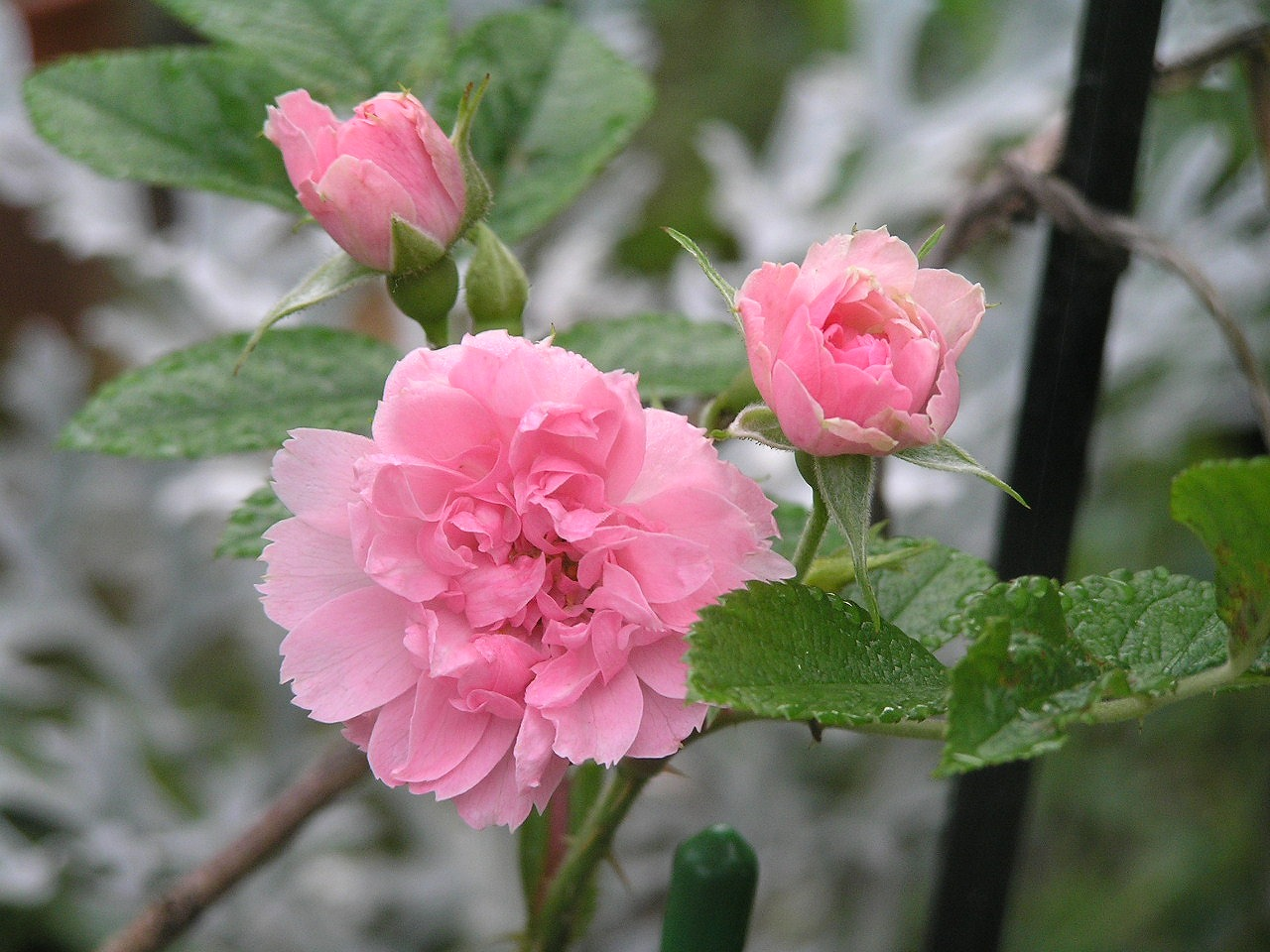 ピンクグルテンドルスト（OL)